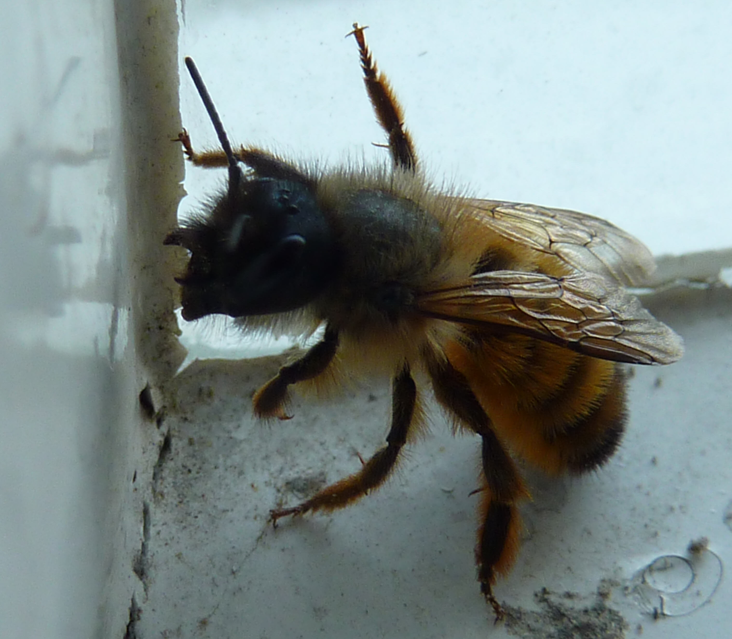 Gehörnte Mauerbiene, weiblich